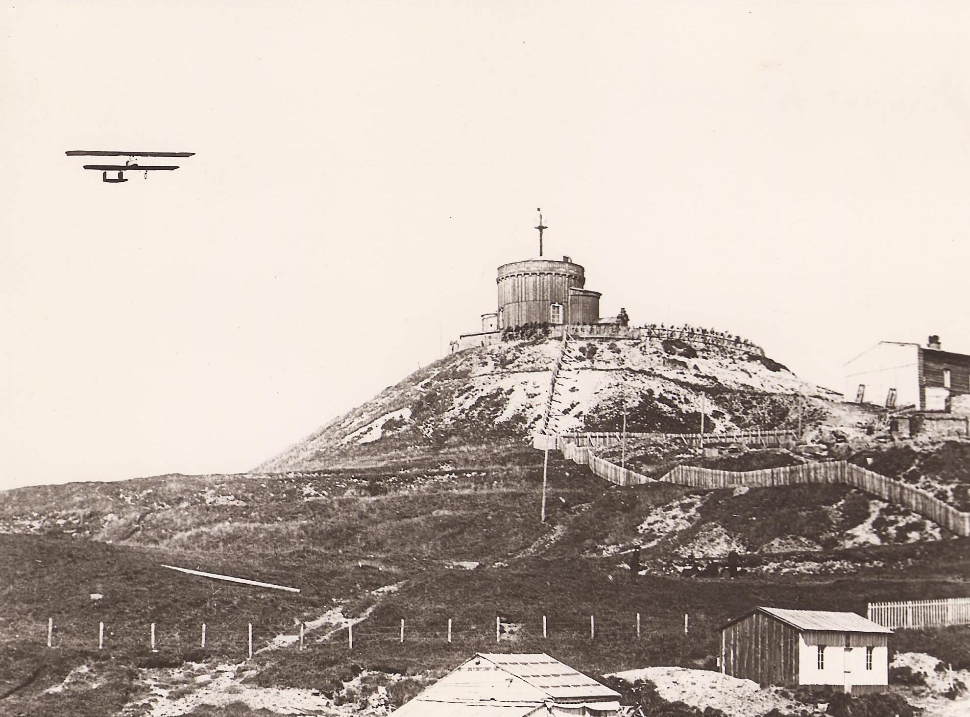 Eugène Renaux avant son atterissage grand Prix Michelin d'Aviation 1911